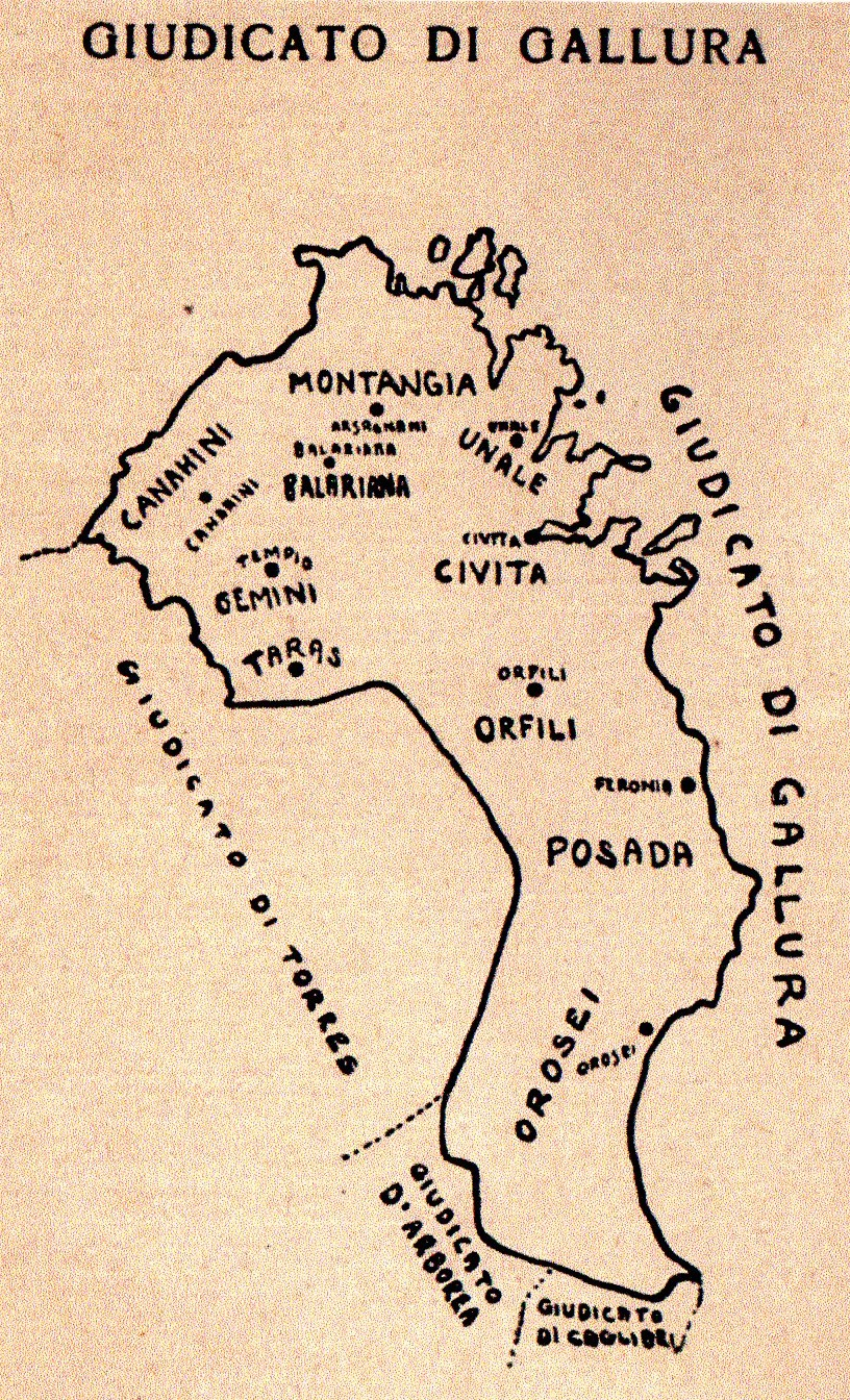 carta del Giudicato di Gallura